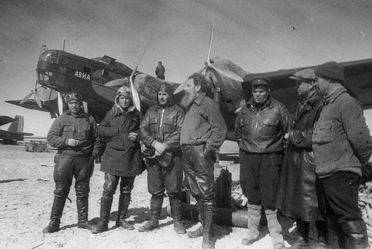 Участники экспедиции Северный Полюс 1, Герои Советского Союза: И. Т. Спирин, М. И. Шевелёв, М. С. Бабушкин, О. Ю. Шмидт, М. В. Водопьянов, А. Д. Алексеев, В. С. Молоков